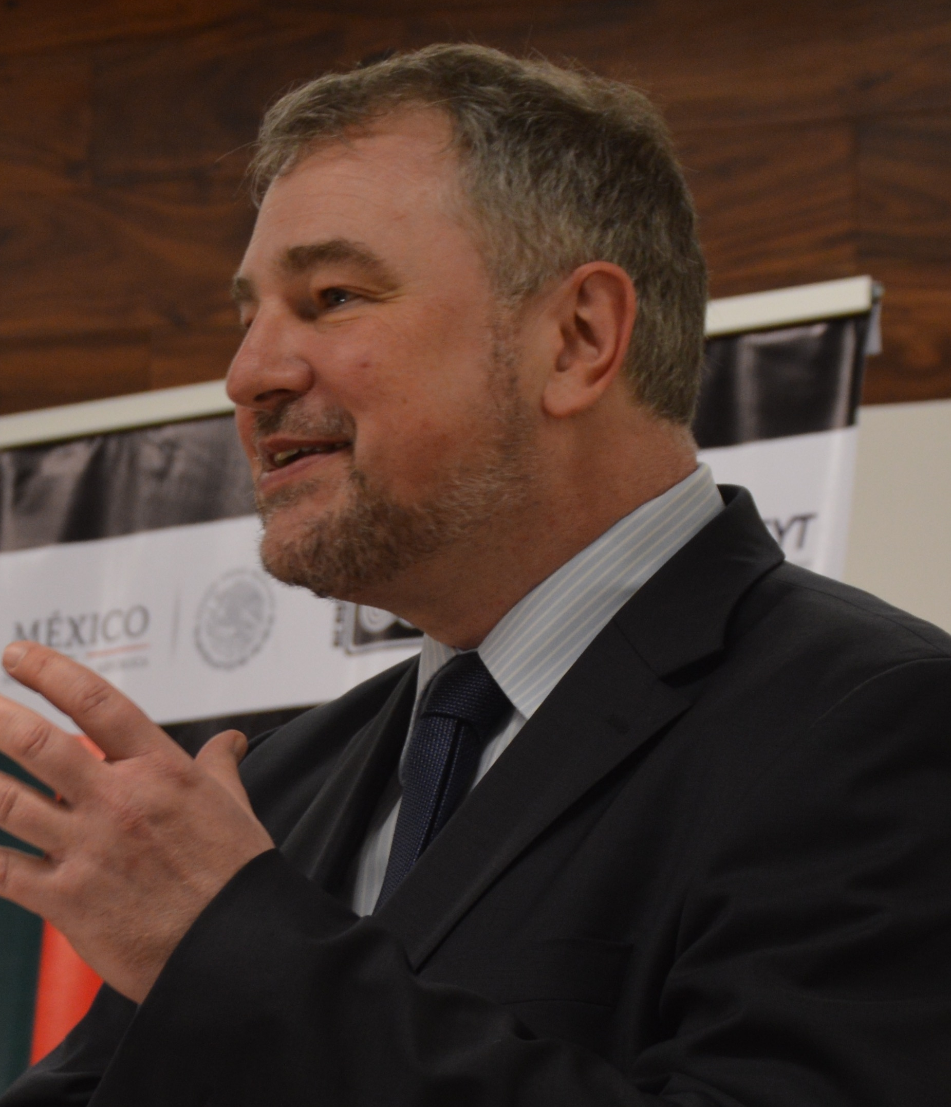 Stefan Rinke während der Verleihung des Forschungspreis José Antonio Alzate in Mexiko.